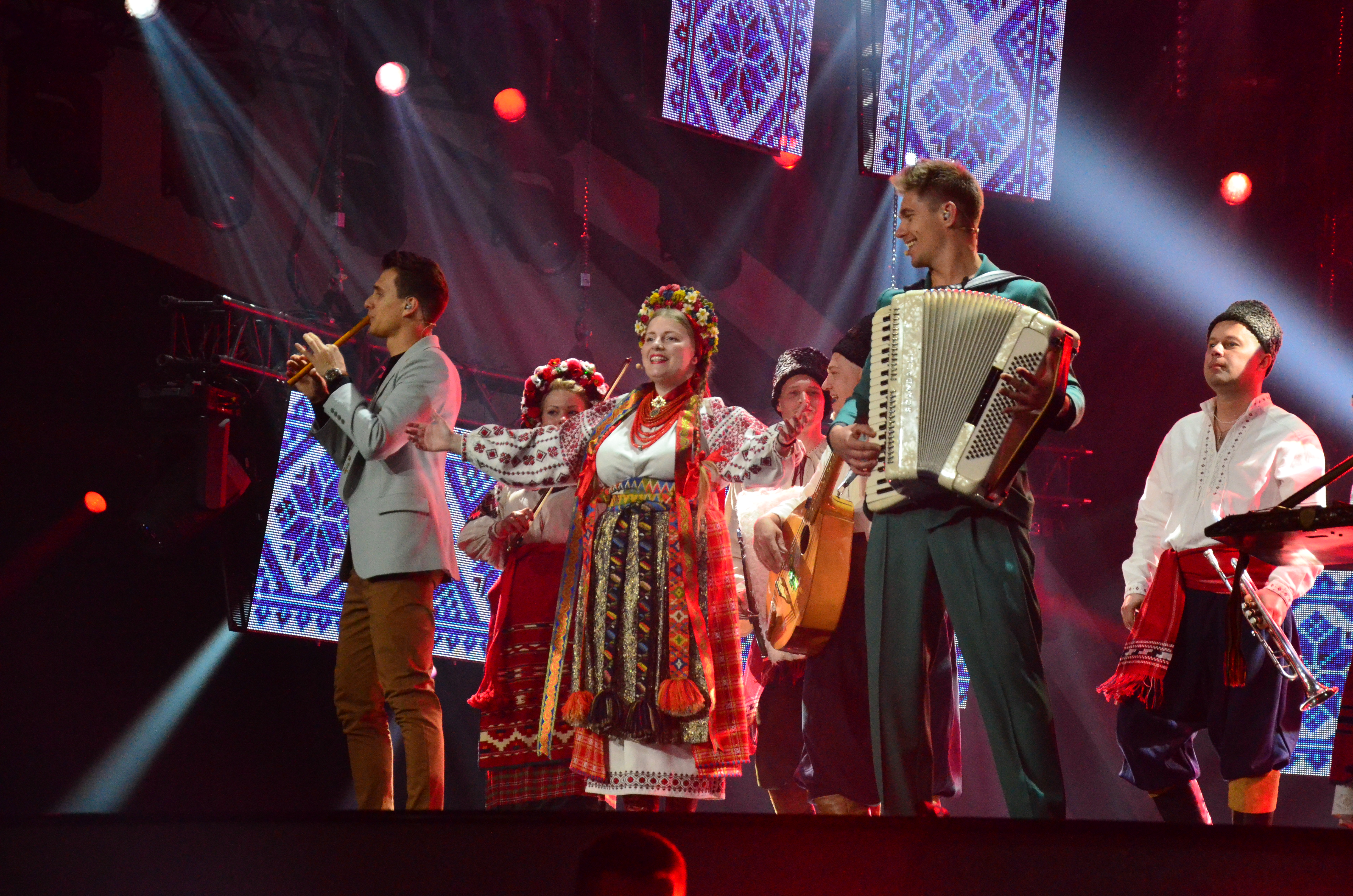 10 травня 2017 року у Києві відбулась генеральна репетиція 2 півфіналу "Євробачення".